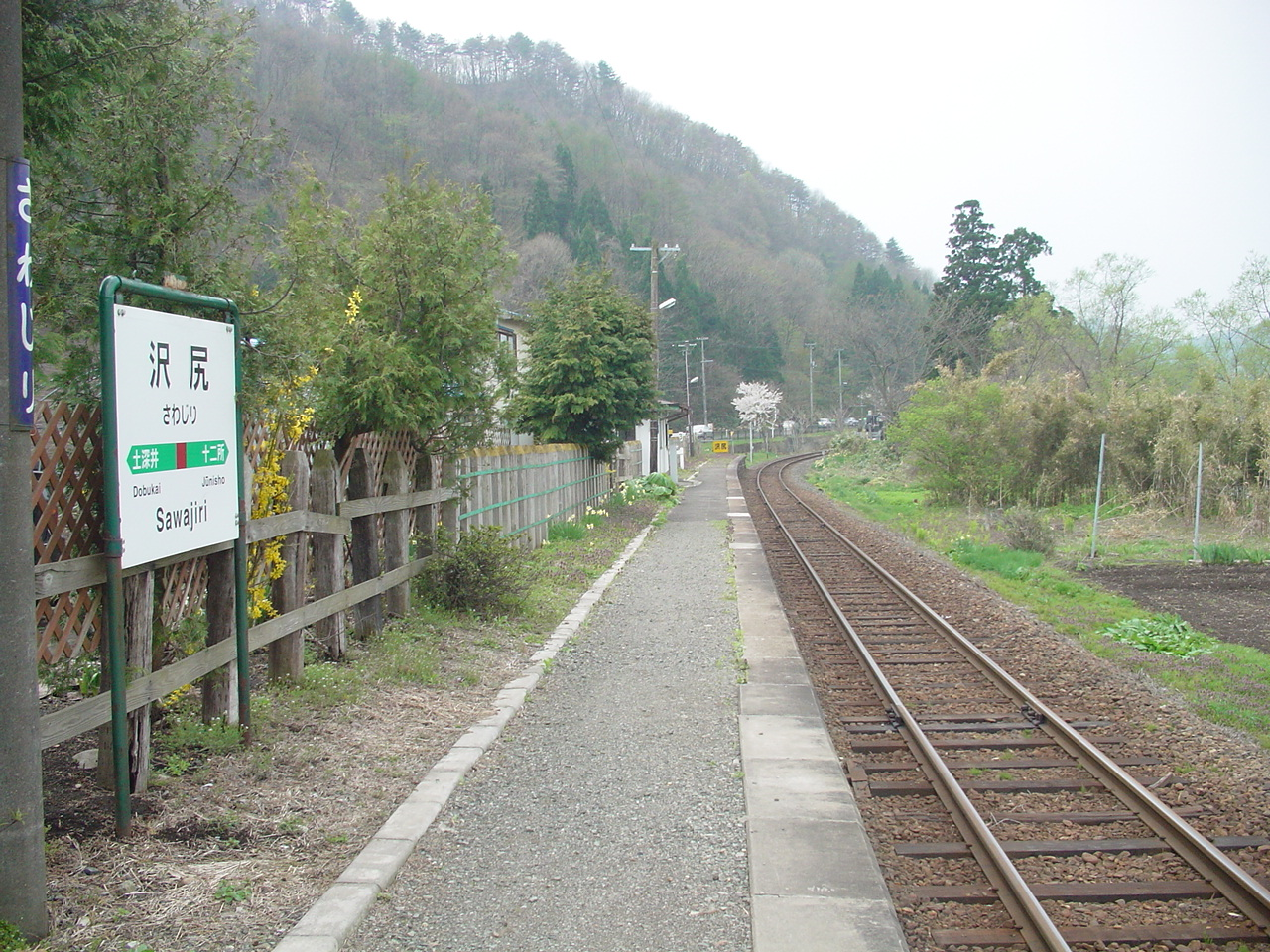 （沢尻駅）